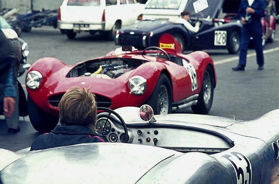 Borgward RS, Baujahr 1956, Cockpit, beim Oldtimer-Grand-Prix.